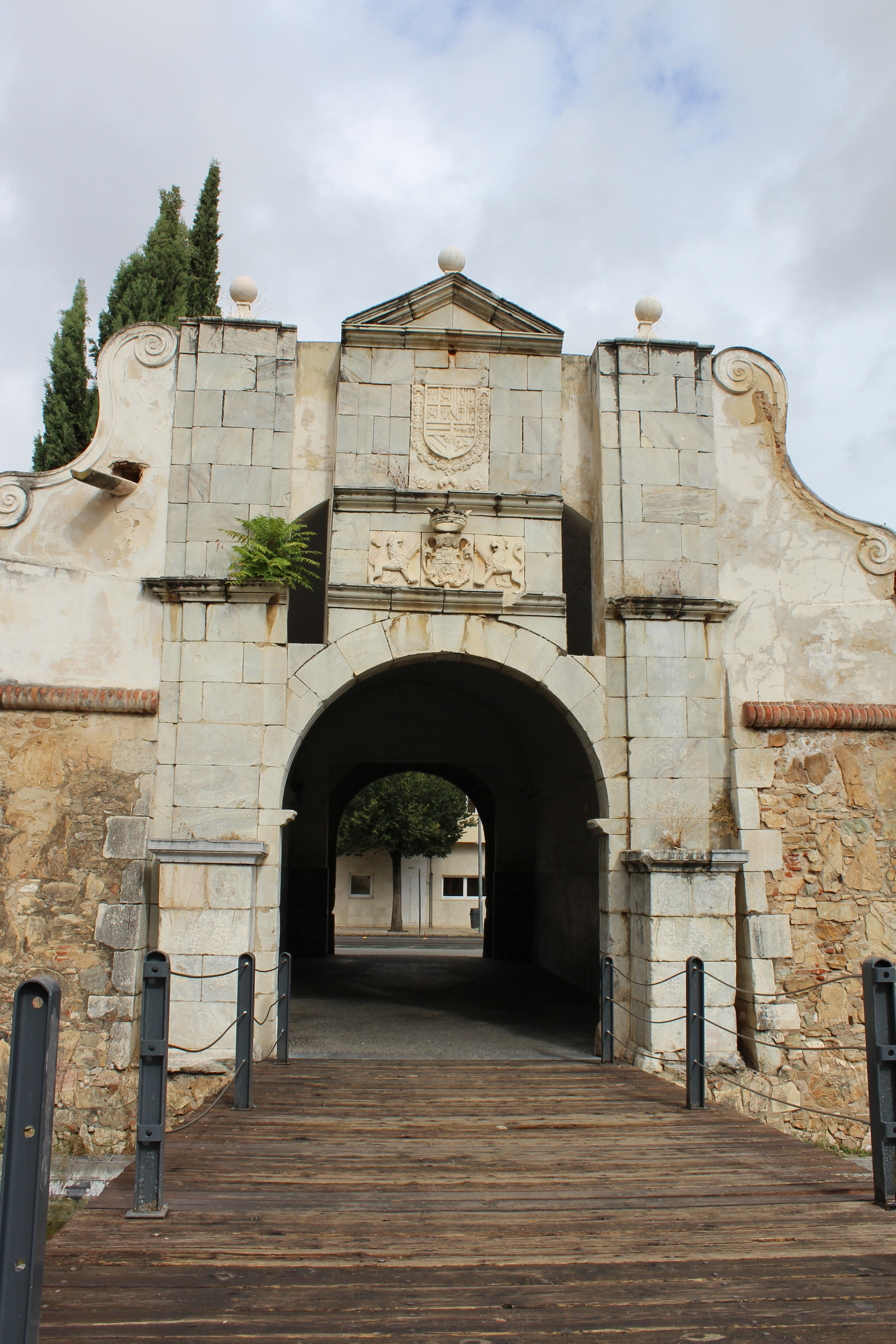 Fachada exterior y puente levadizo.